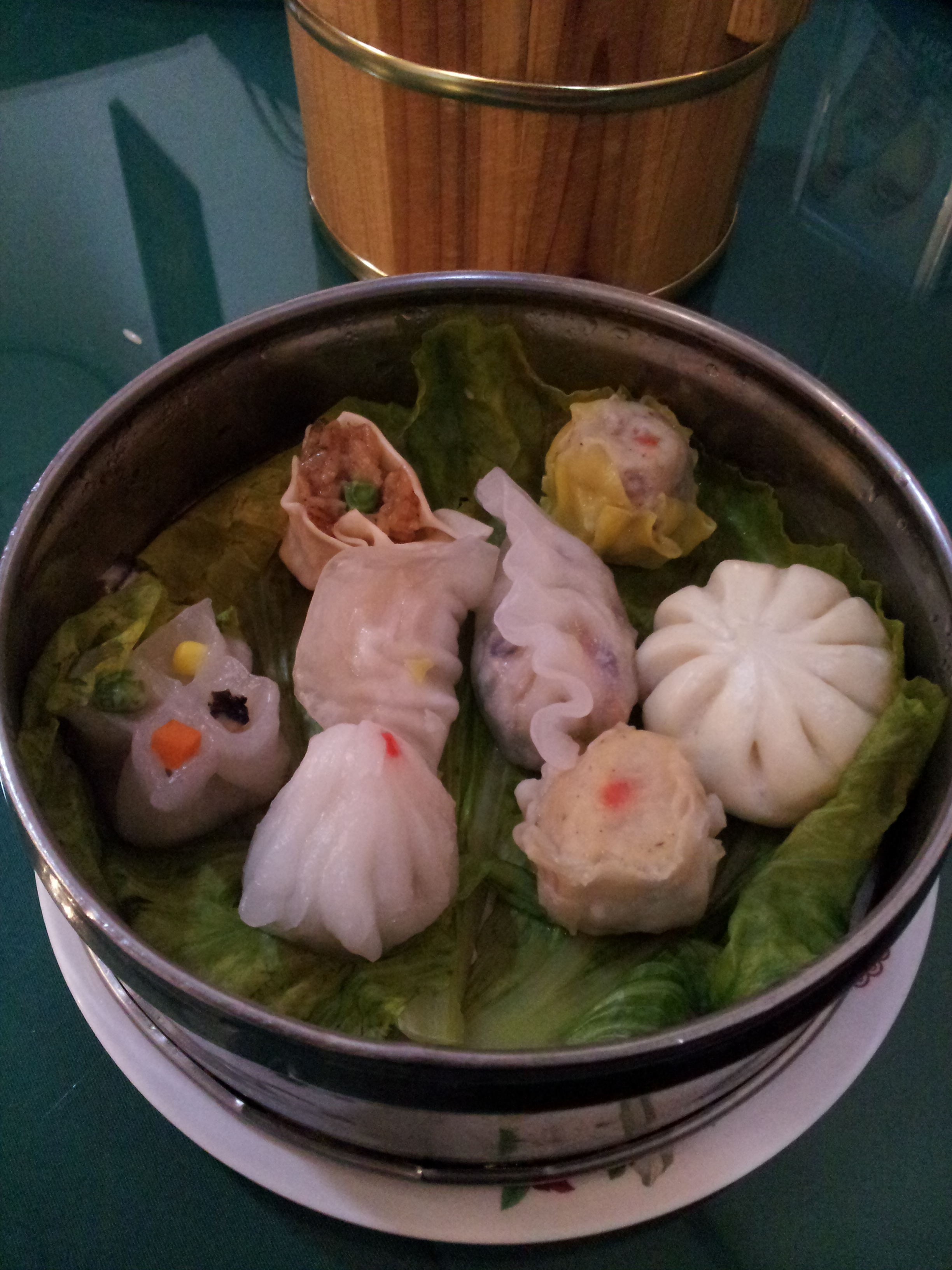 D'un restaurant a València